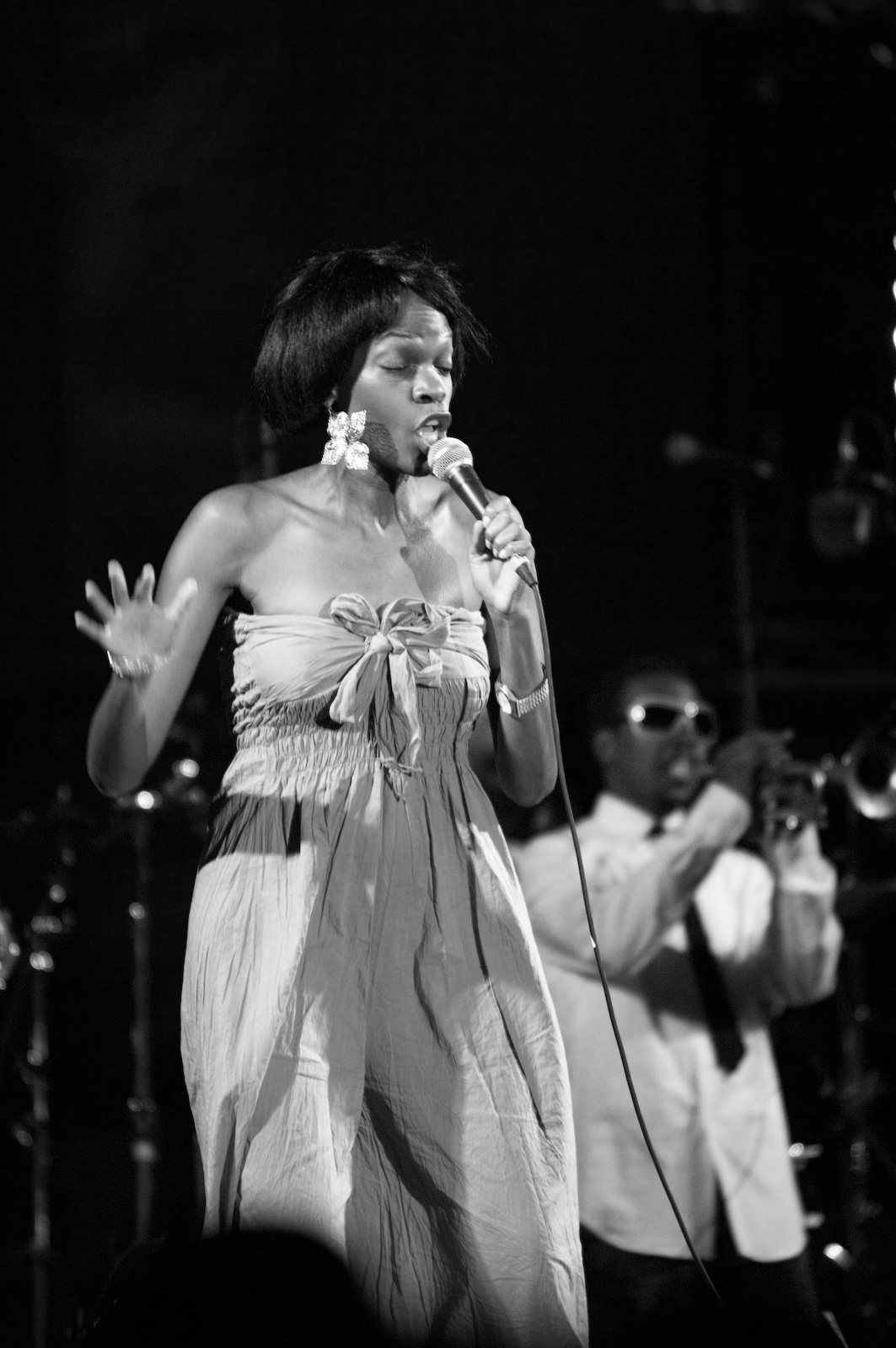 Roy Hargrove's RH Factor invite MC Solaar, Festival Jazz des Cinq Continents, Marseille Juillet 2009